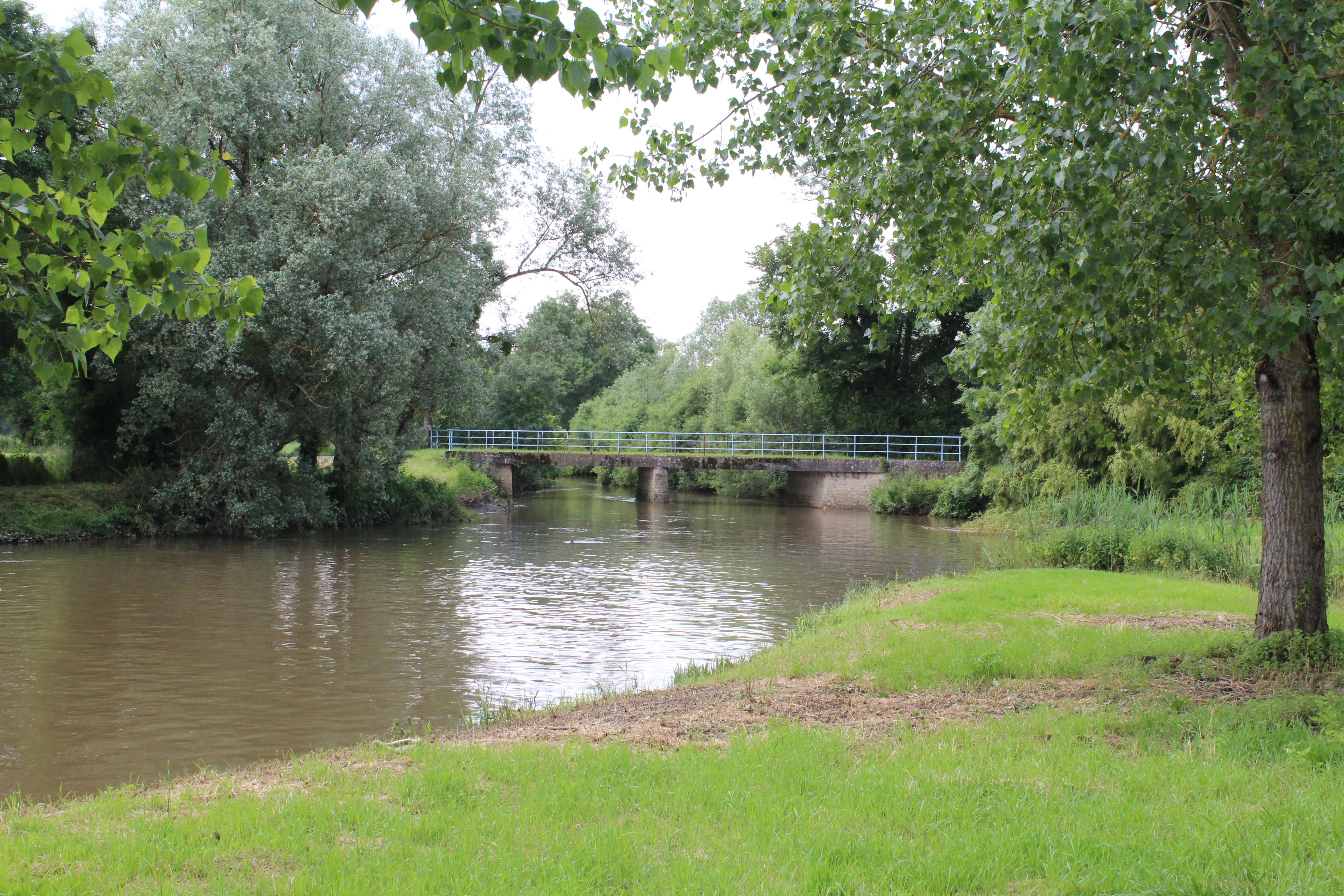 Pont enjambant la Veyle à Corsant, hameau de Perrex.